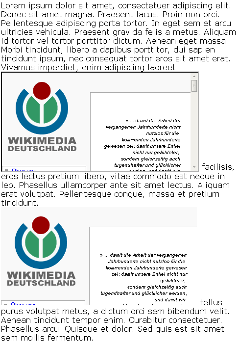 Inlineframe, Beispiel: Wikimedia-Homepage in einem Inlineframe